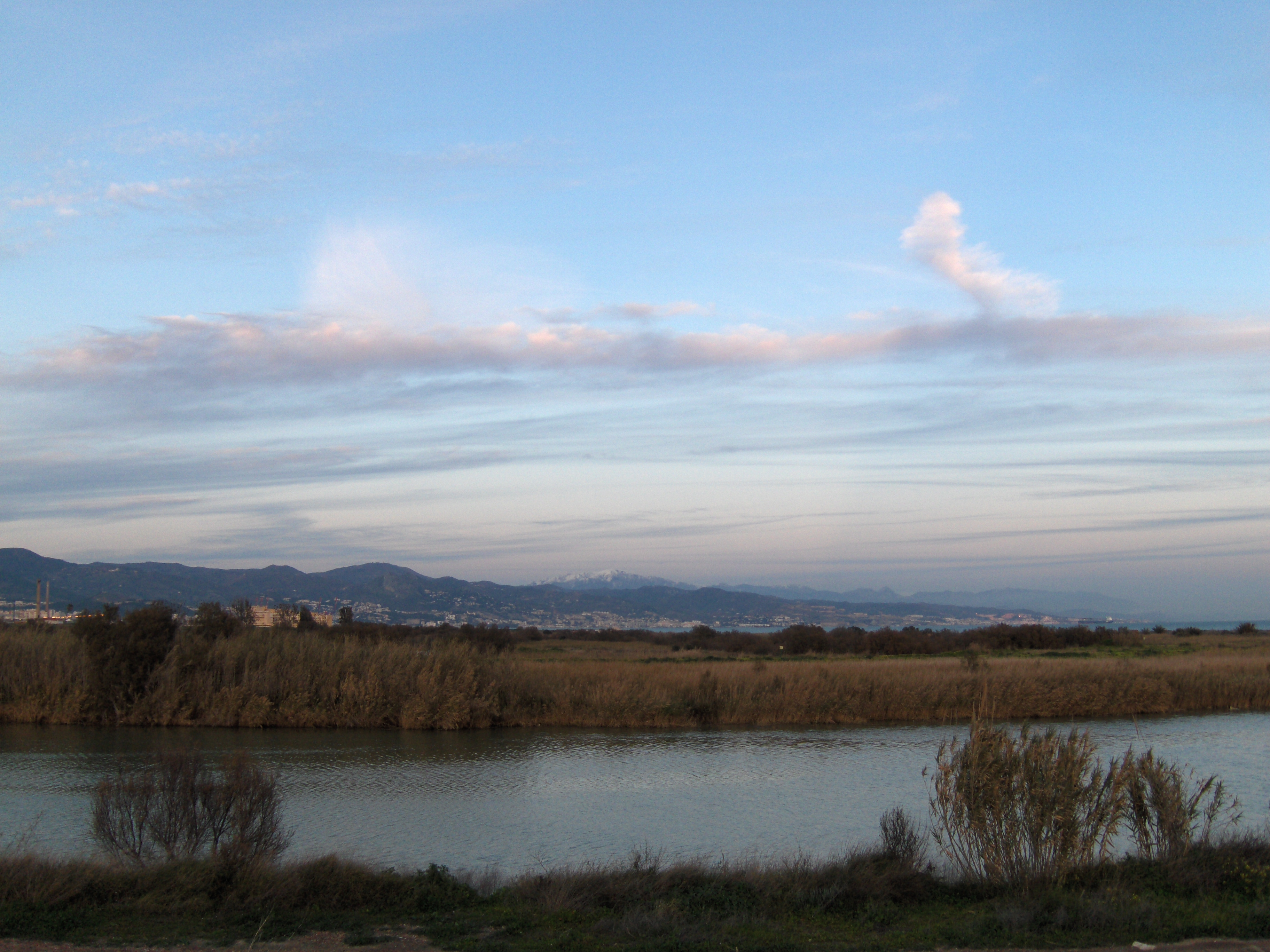 Paraje Natural de la Desembocadura del Guadalhorce (Málaga).